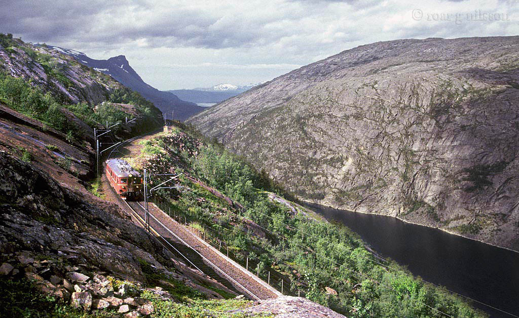 Enkel BM67 som lokaltog Narvik-Bjørnfjell. Bildet er tatt ved banenes km 26 mellom Rombak og Katterat. Rombaksbotn nede til høyre.